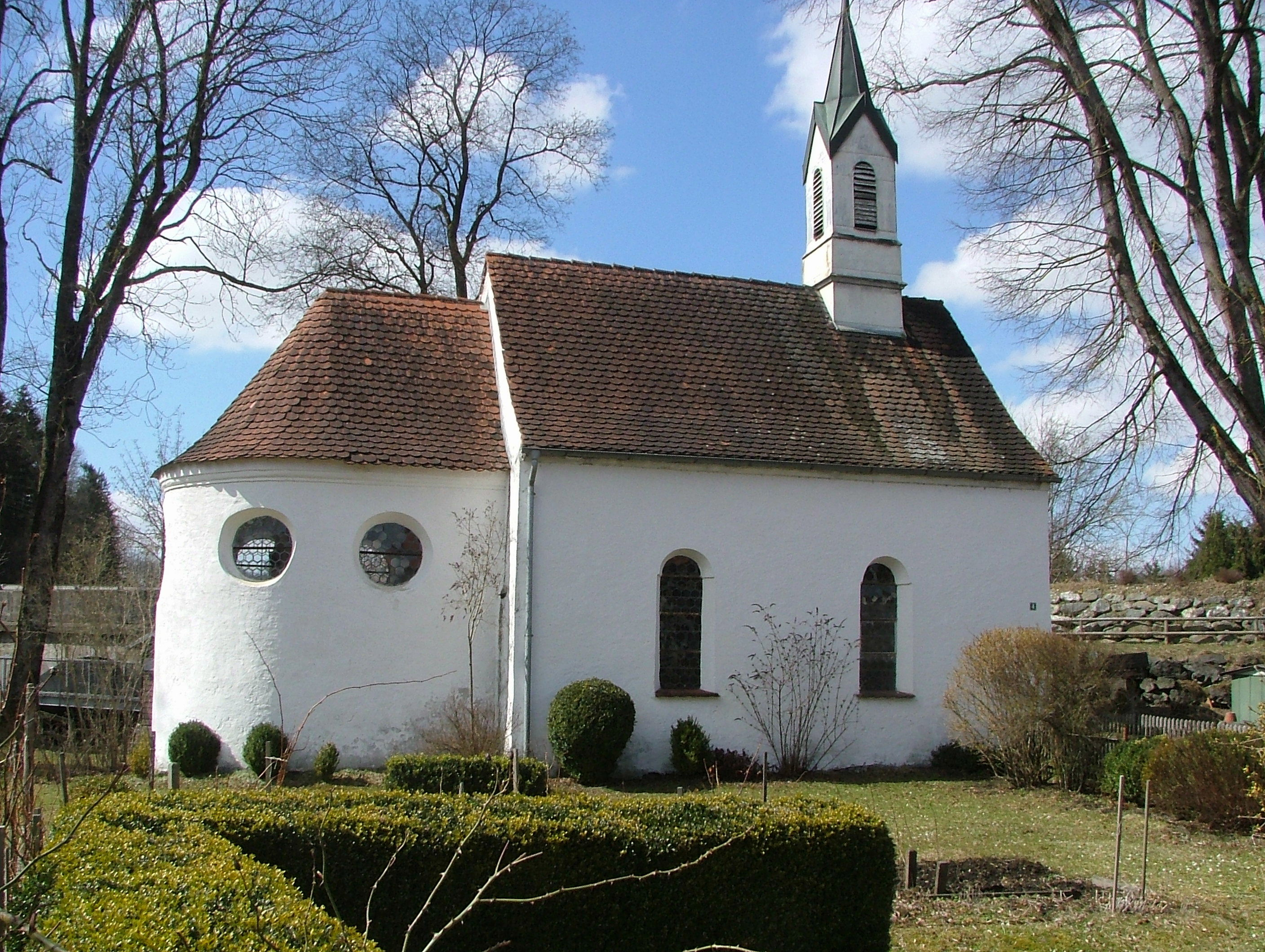 St.Magnus Kapelle Leubas Kempten